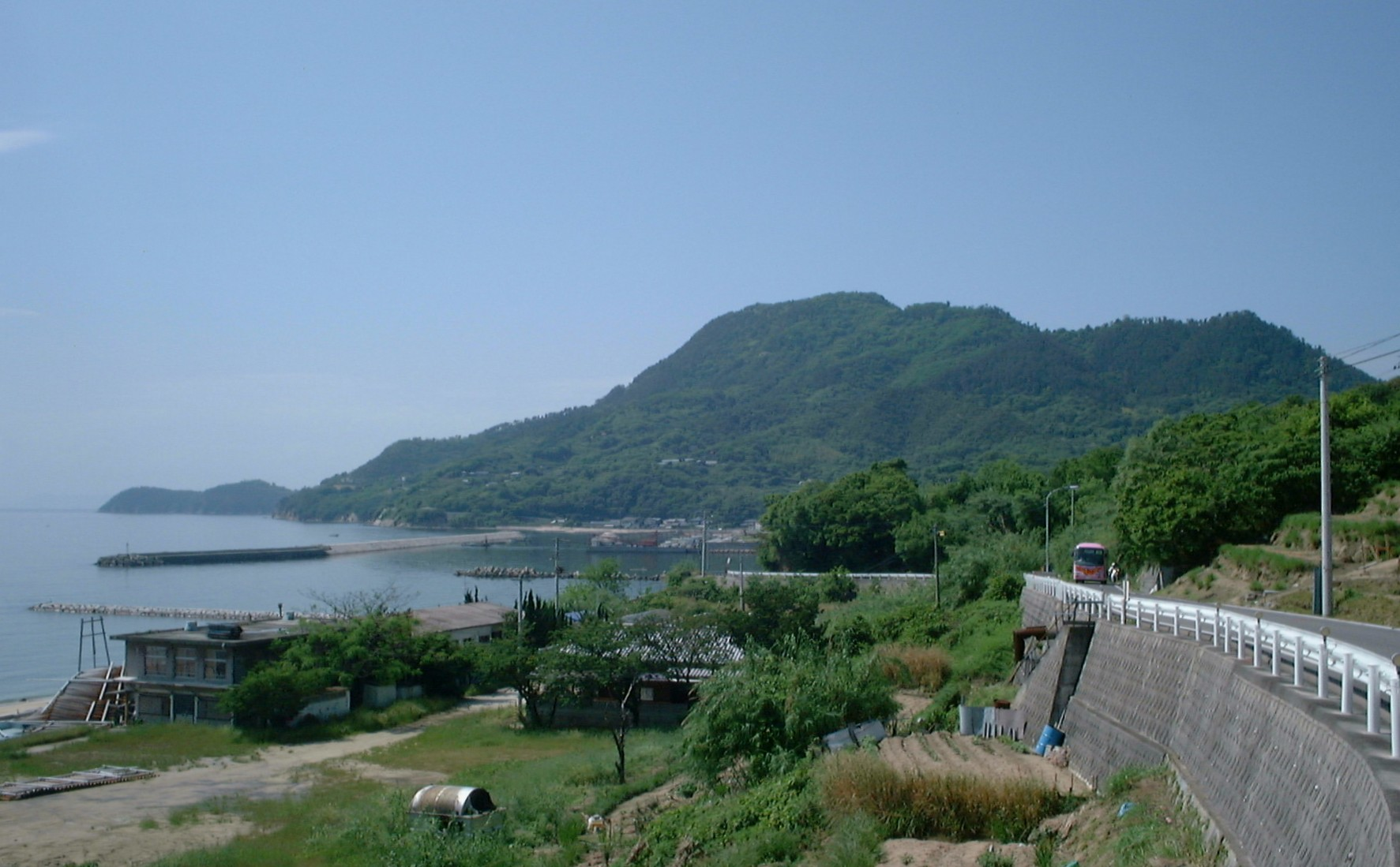 荘内半島に向かう海岸道路より